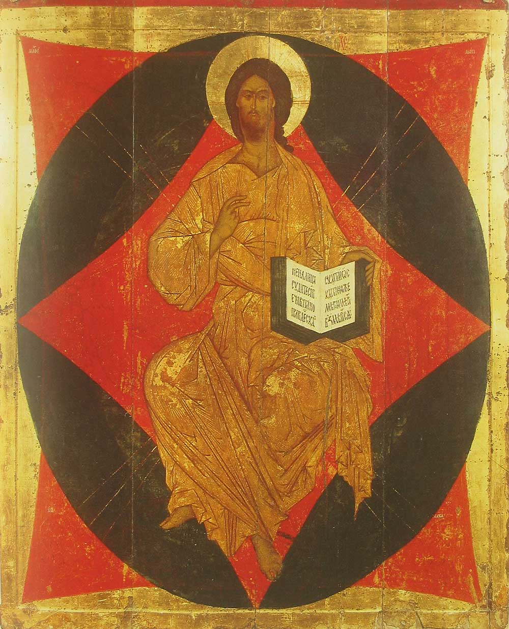 Спас в силах Из деисусного чина Школа или худ. центр: Ярославль Первая половина — середина XVI в. 173 × 141 см Ярославский историко-архитектурный и художественный музей заповедник, Ярославль, Россия Инв. 40932 Из деисусного чина иконостаса Спасо-Преображенского собора Спасского монастыря в Ярославле.